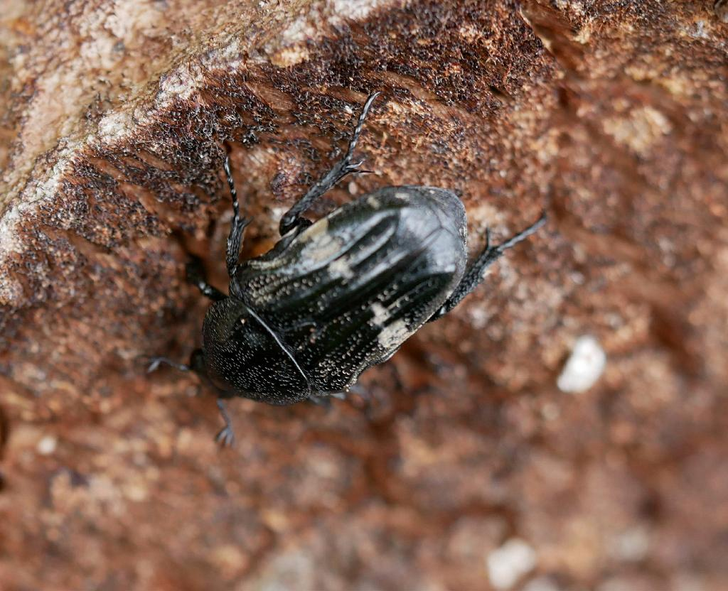 2019/06/03 和歌山県田辺市：Tanabe City. Wakayama Pref. Japan